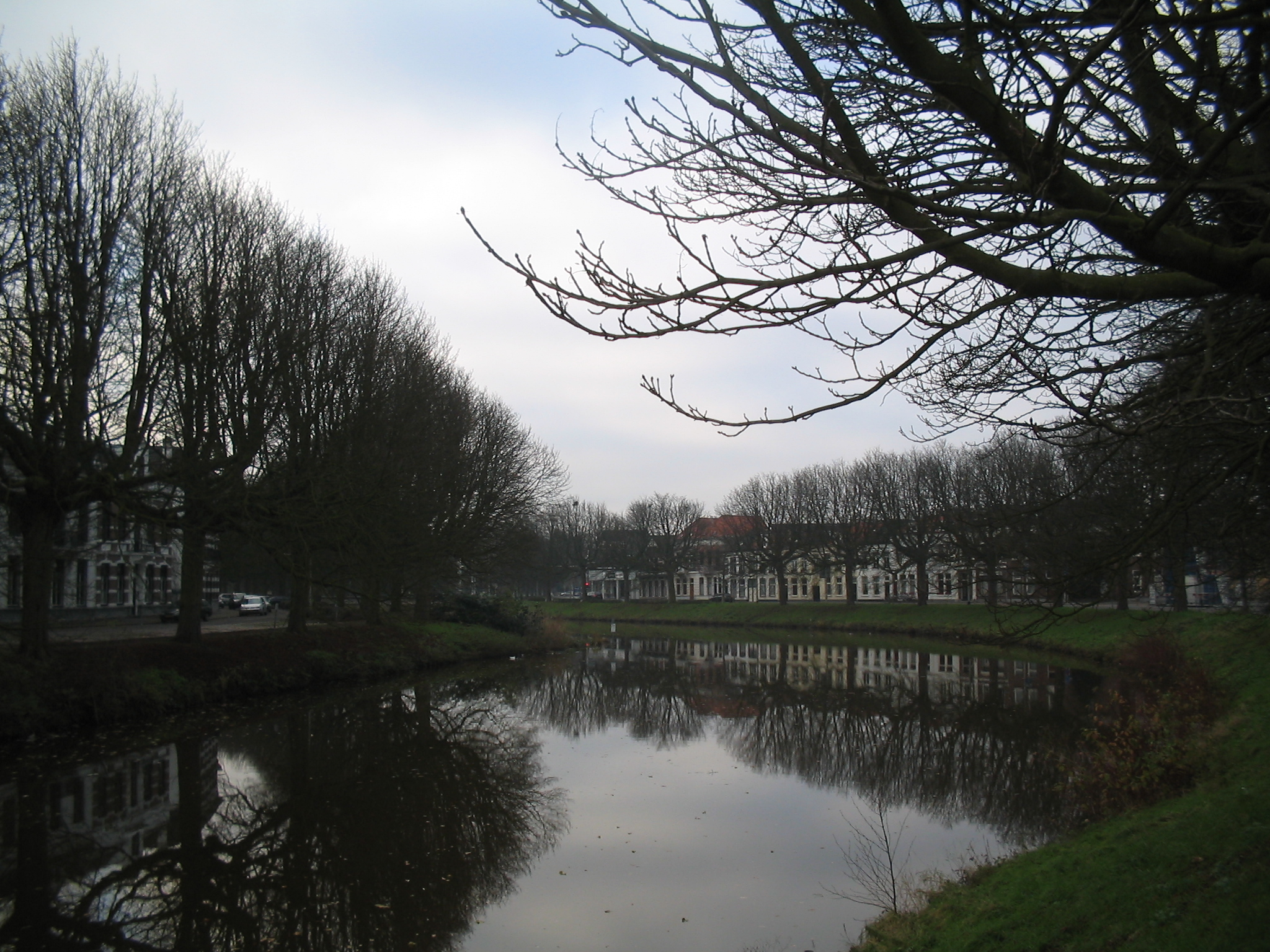 Breda , Mark, dec. 2005